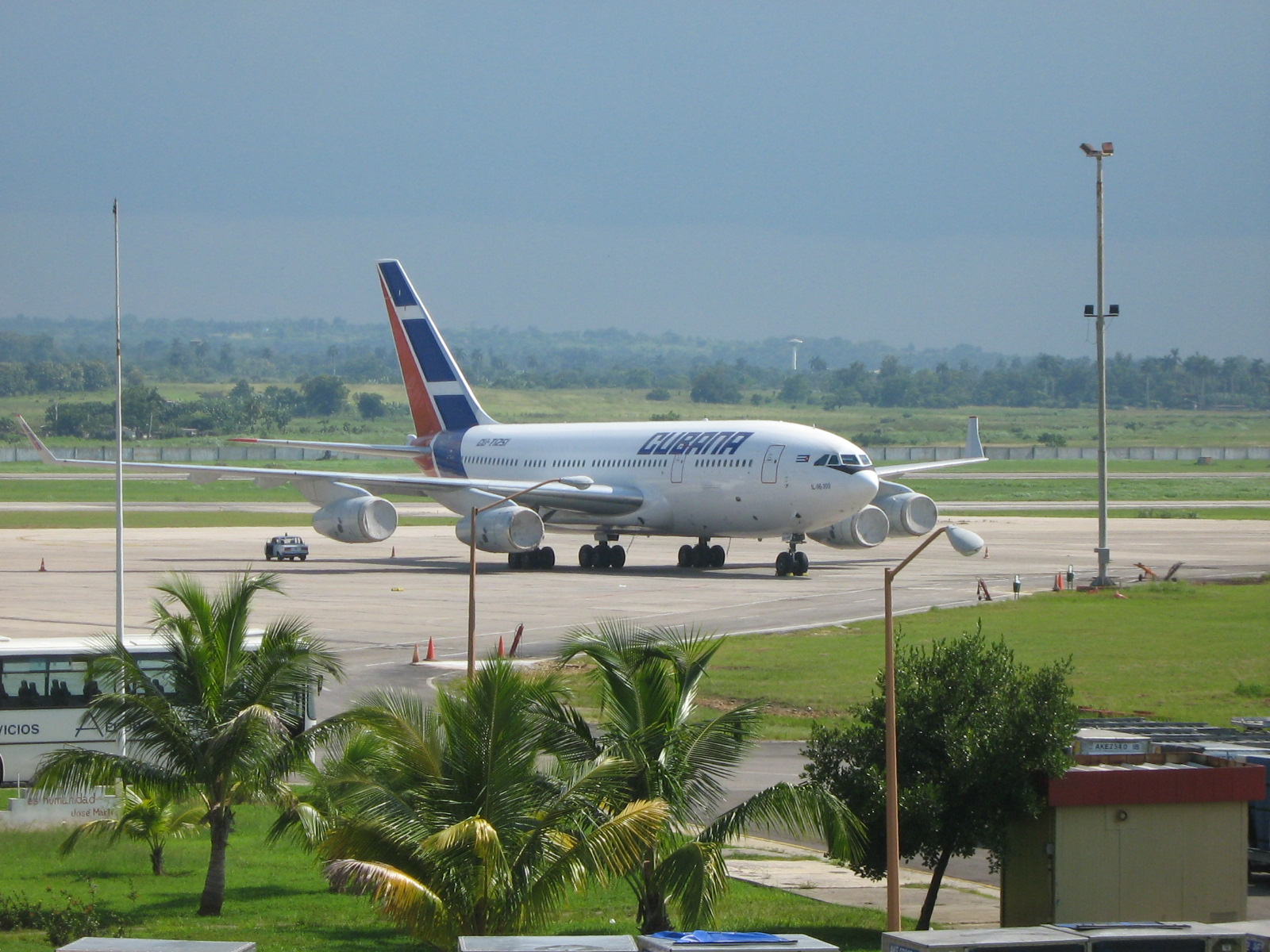 avión IL 96 de Cubana de Aviacion en el Aeropuerto de La Habana